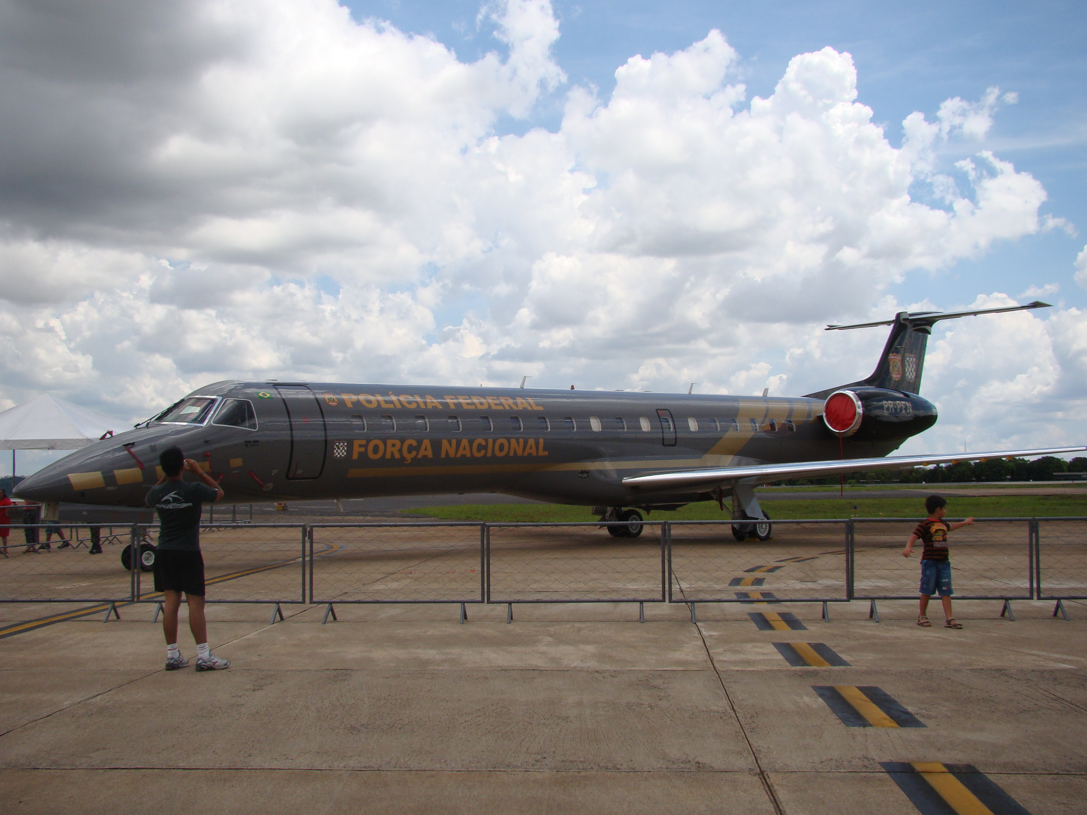 Coordenadoria de Aviação Operacional Departamento de Polícia Federal E Força Nacional de Segurança Pública